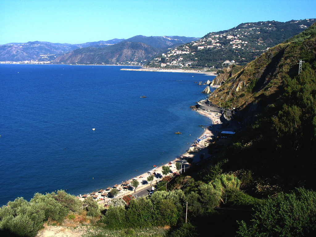 Saracen Coast